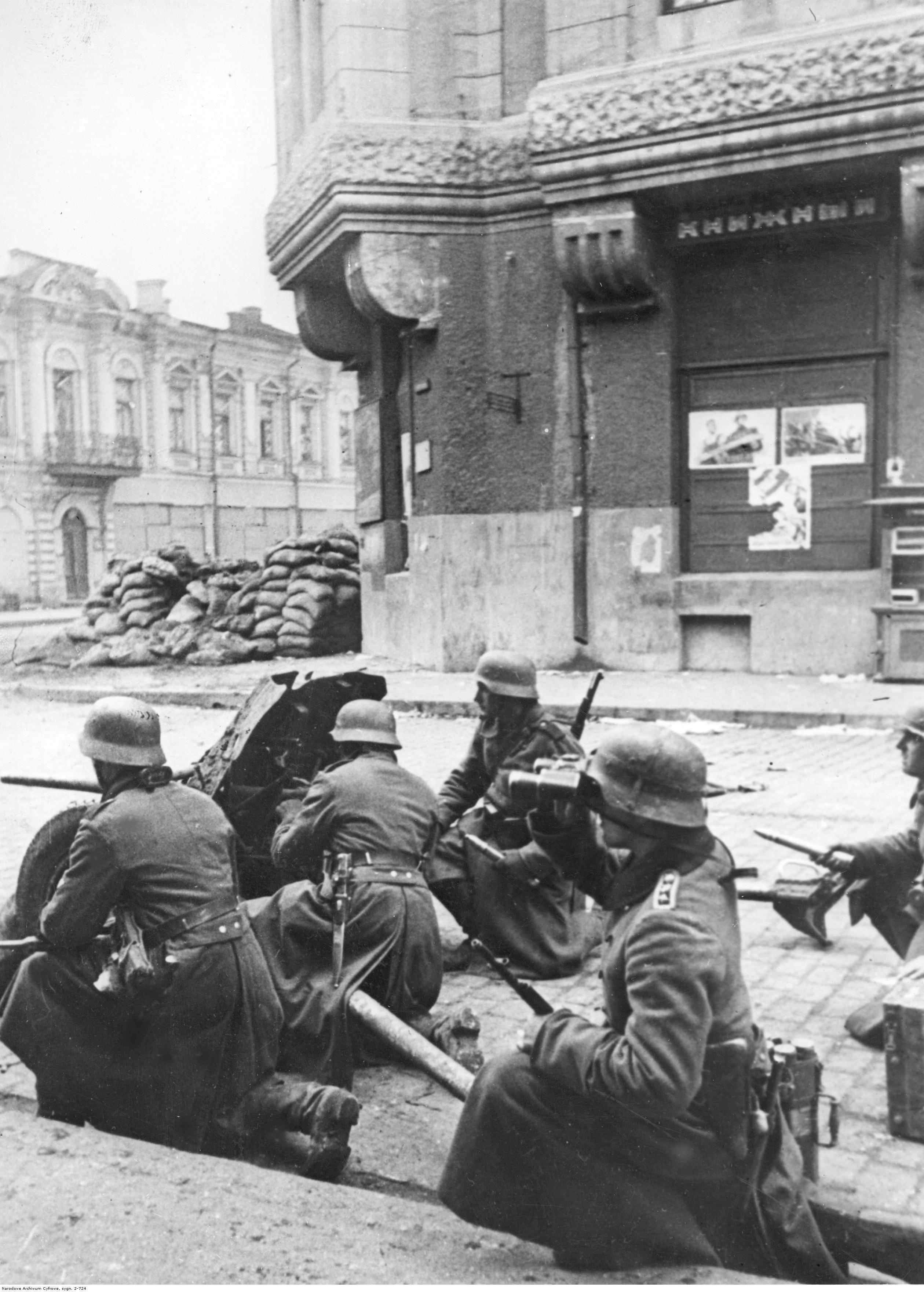 Pięciu żołnierzy z 89 pułku piechoty z armatą Pak 35/36 kal. 37 mm na ulicy miasta. W tle widoczna barykada z worków z piaskiem.